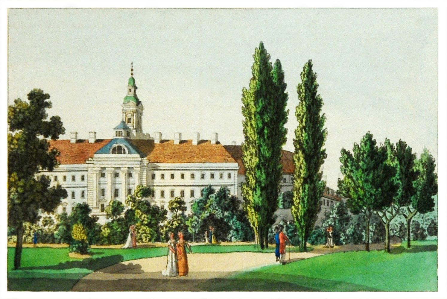 Das Waisen-, Zucht- und Versorgungshaus St. Georgen in Leipzig 1804, aquarellierter Kupferstich 12 × 18 cm von Karl Benjamin Schwarz. Das Haus war auch Irrenastalt.Romantische Gemählde von Leipzig. Eine Folge von vier und zwanzig Prospekten gezeichnet und gestochen von Carl Benjamin Schwarz. Karl Tauchnitz, Leipzig, 1804, Tafel Nr. 3. Foto --Hans-Peter Haack 13:00, 7. Jun. 2009 (CEST)